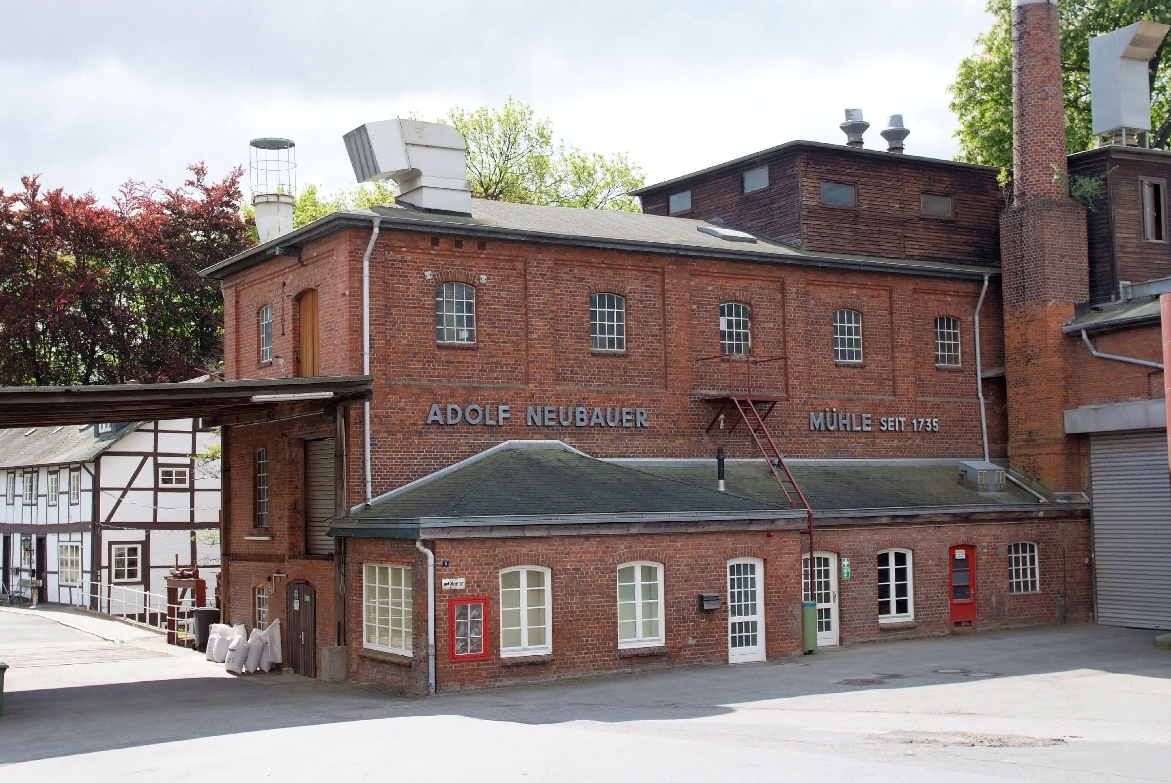 Adolf Neubauer Mühle - An der Glinder Au, in Hamburg-Billstedt (Kirchsteinbek)This is a photograph of an architectural monument.